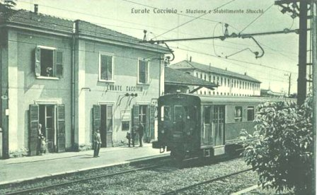 Lurate Caccivio, stazione e Stucchi